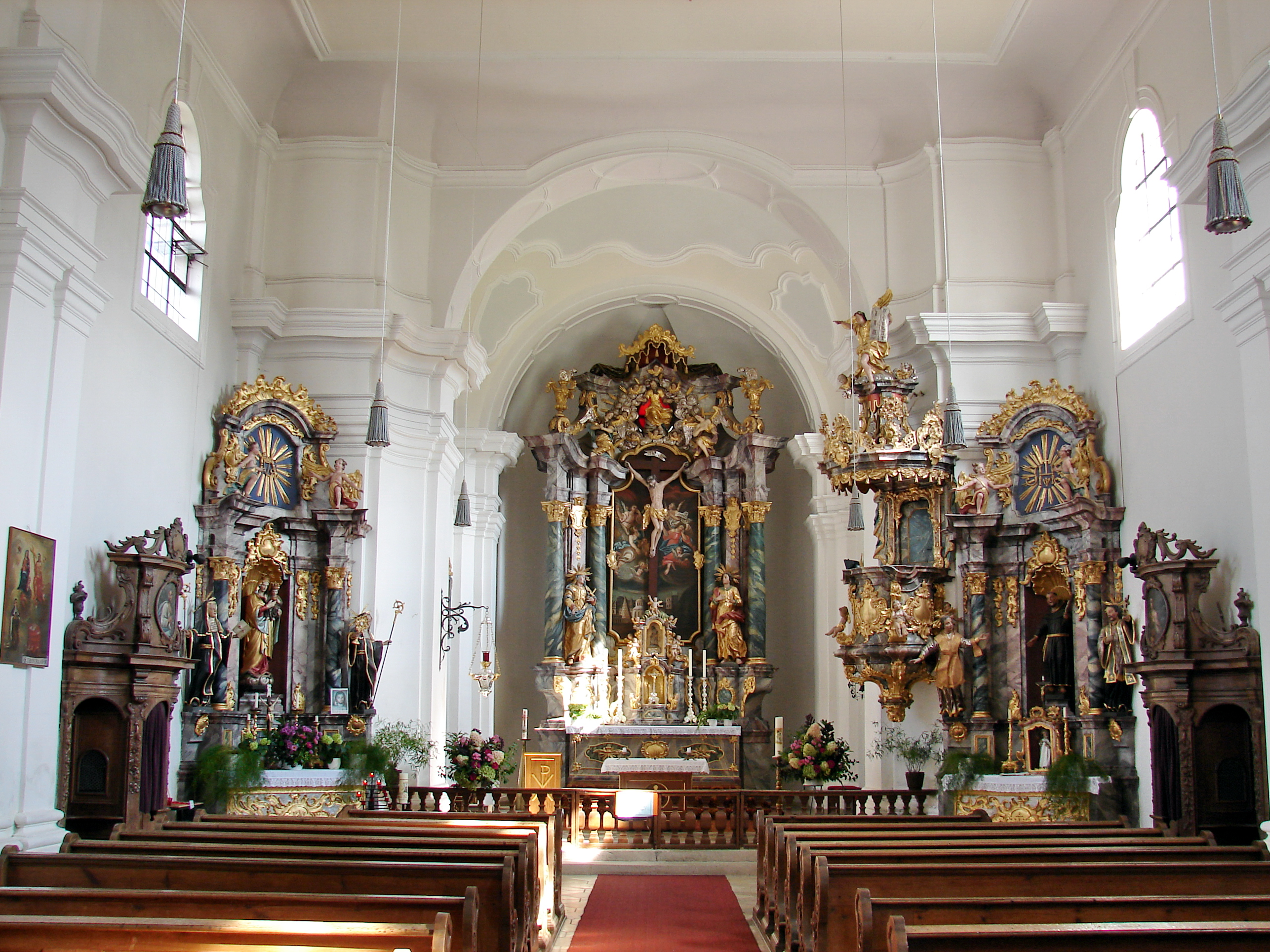 Die Wieskirche „Zum gegeißelten Heiland“ ist eine römisch-katholische Wallfahrtskirche.